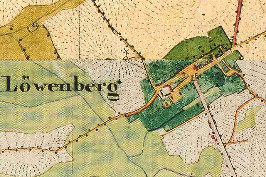 Karte von Löwenberg, Kreis Ruppin, Provinz Brandenburg, 1825 (oberer Teil) und 1840 (unterer Teil)